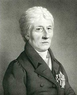 Beskrivelse: Constantin Brun (1746-1836), dansk storkøbmand